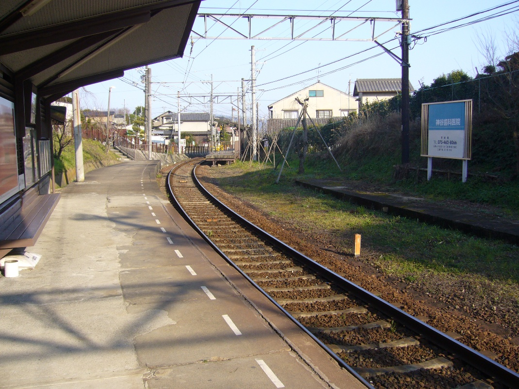 京福電気鉄道北野線高雄口駅（現・宇多野駅）のホームの配置。撮影しているのは北野白梅町駅行きホームで、向こう側がワンマン化の際に後から設置された帷子ノ辻駅行きのホーム。千鳥式の配置にしているのは、ひとつはワンマン運転の際、常に料金箱側の左側のドアを開閉するため。もうひとつは構内踏切の設置を回避するためである。帷子ノ辻行きのホームは、向こう側に見えている一般道の踏切のところに出入できる。なお、右側にはかつて列車交換が出来た時代の帷子ノ辻行きのホームの跡がある。2007年2月26日に投稿者が撮影。